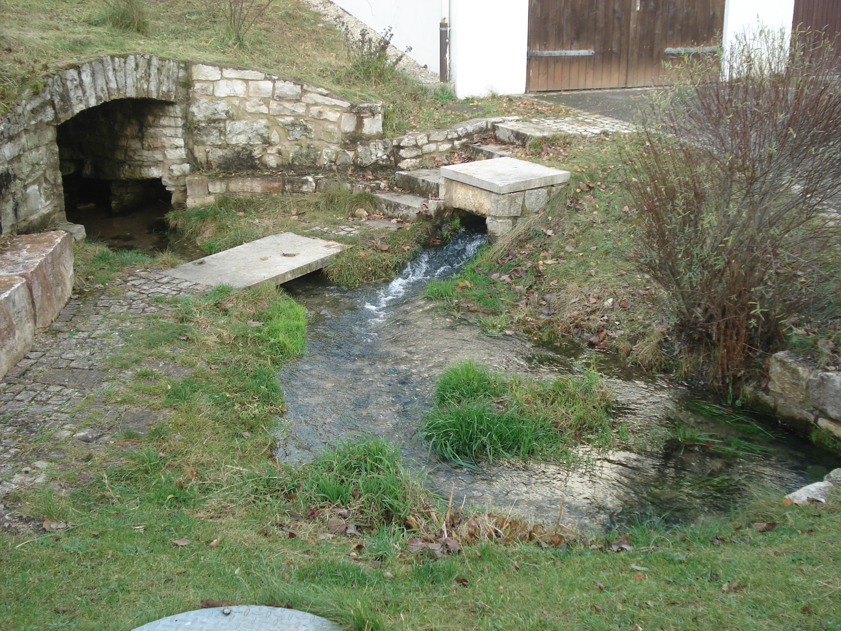 Der Ursprung der Schwarzen Laber